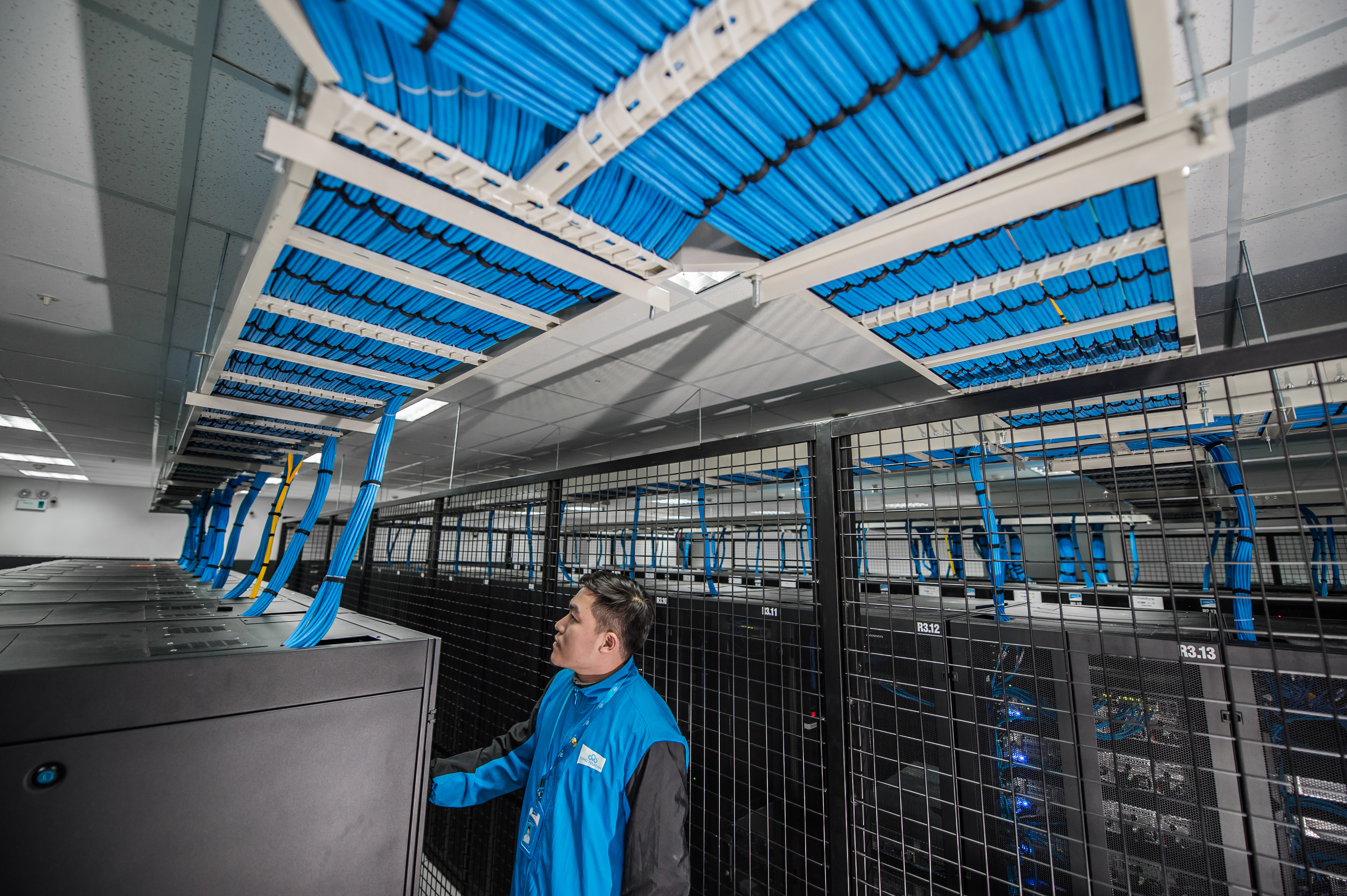 Data Center của CMC Telecom